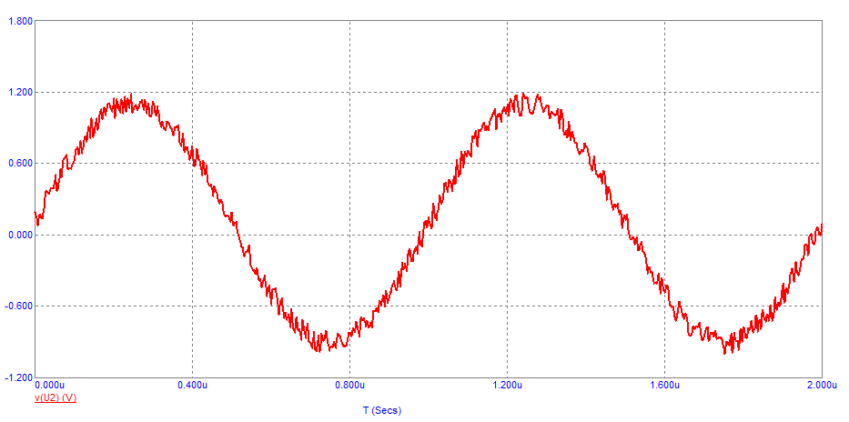 Siniaaltoon summattu satunnaista kohinaa, jännite ajan funktiona